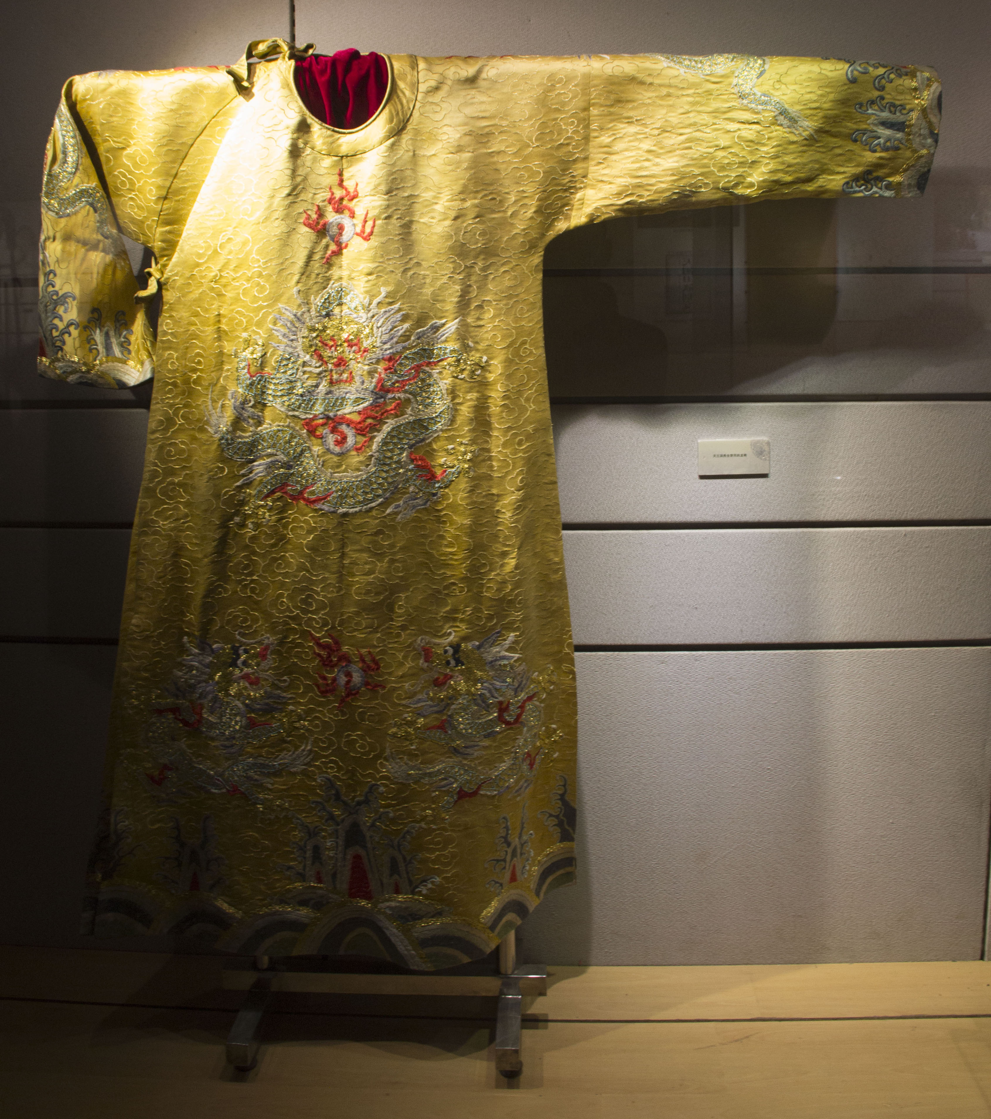 太平天国纪念馆